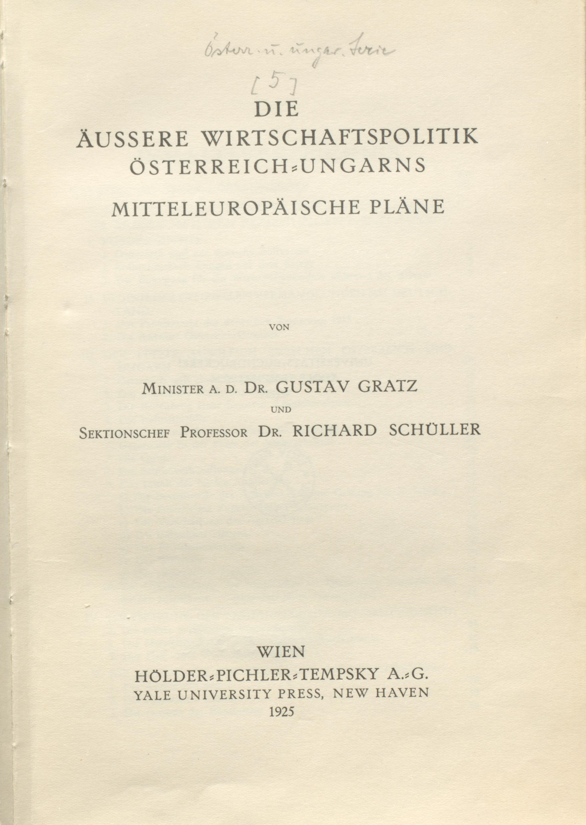 Gusztáv Gratz Richard Schüller Die äussere Wirtschaftspolitik Österreich-Ungarns 1925 Titel